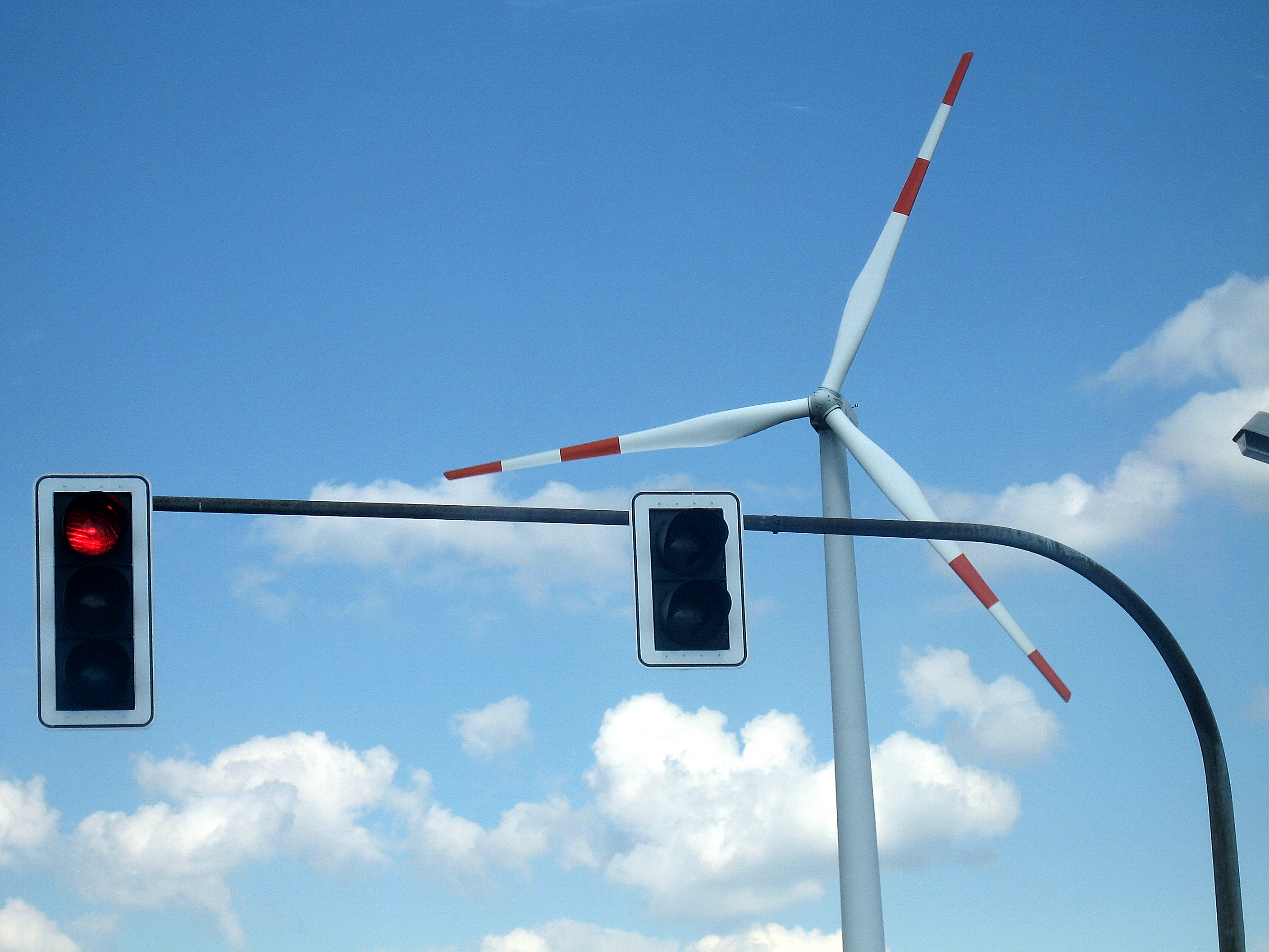 Dortmund, Salingen, Windrad